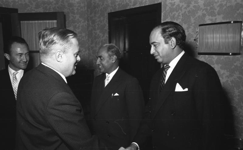 Empfang für den pakistanischen Minister für Energie- und Entwicklungsplanung, Mr. Bhutto.